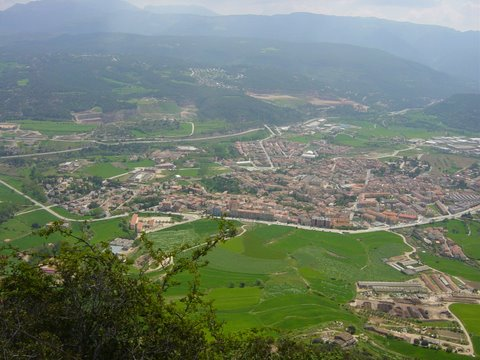 Vista general de Centelles